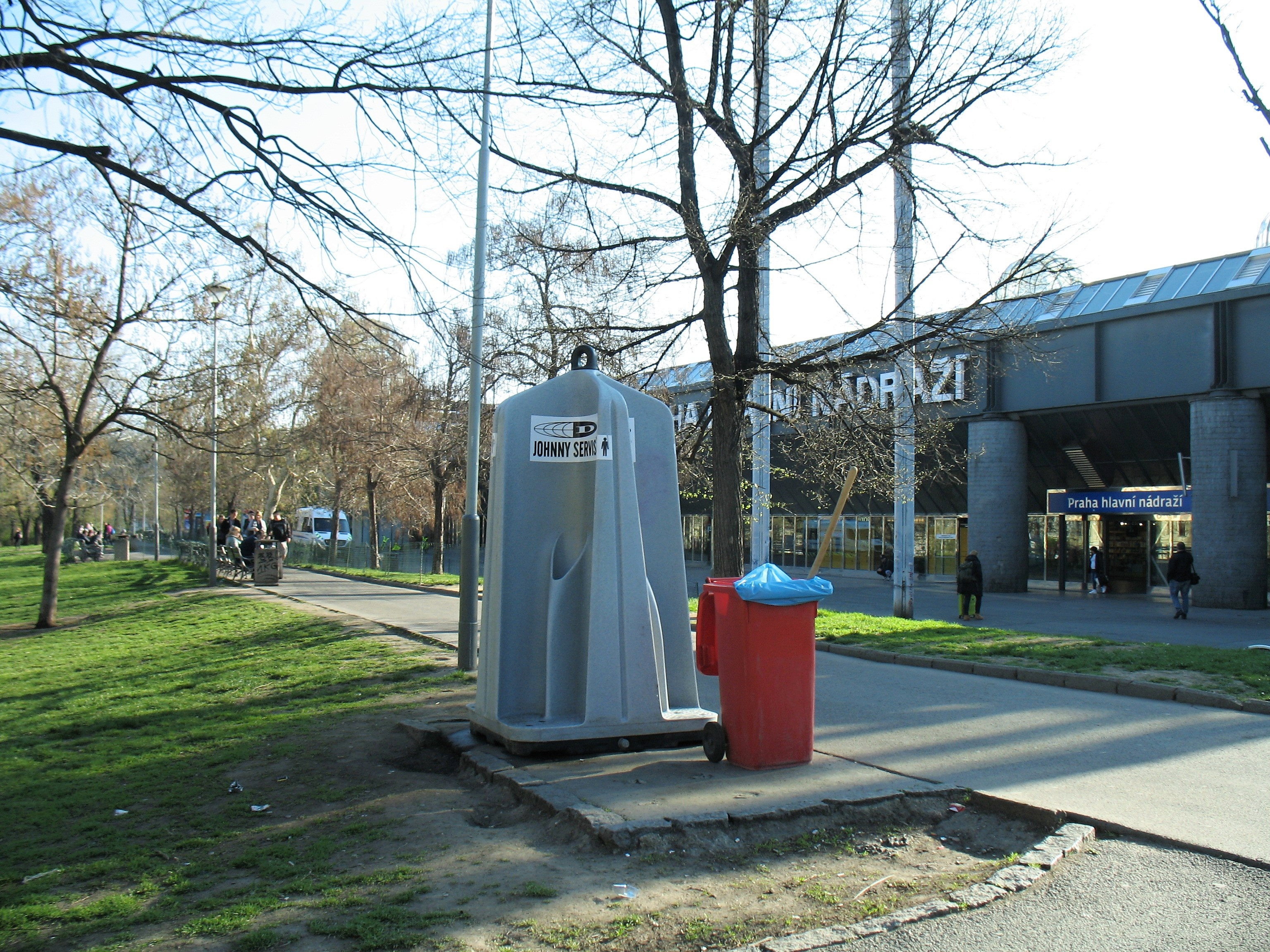 Park Vrchlického sady před hlavním nádražím v Praze. Veřejný pisoár, instalovaný v dubnu 2019 před vstupem do nádraží